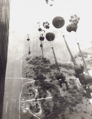 Soldaten des Luftsturmregiment 40 springen bei 350 kmh aus einer AN-8. Dabei ist der Stabilisierungsschirm gut zu sehen.